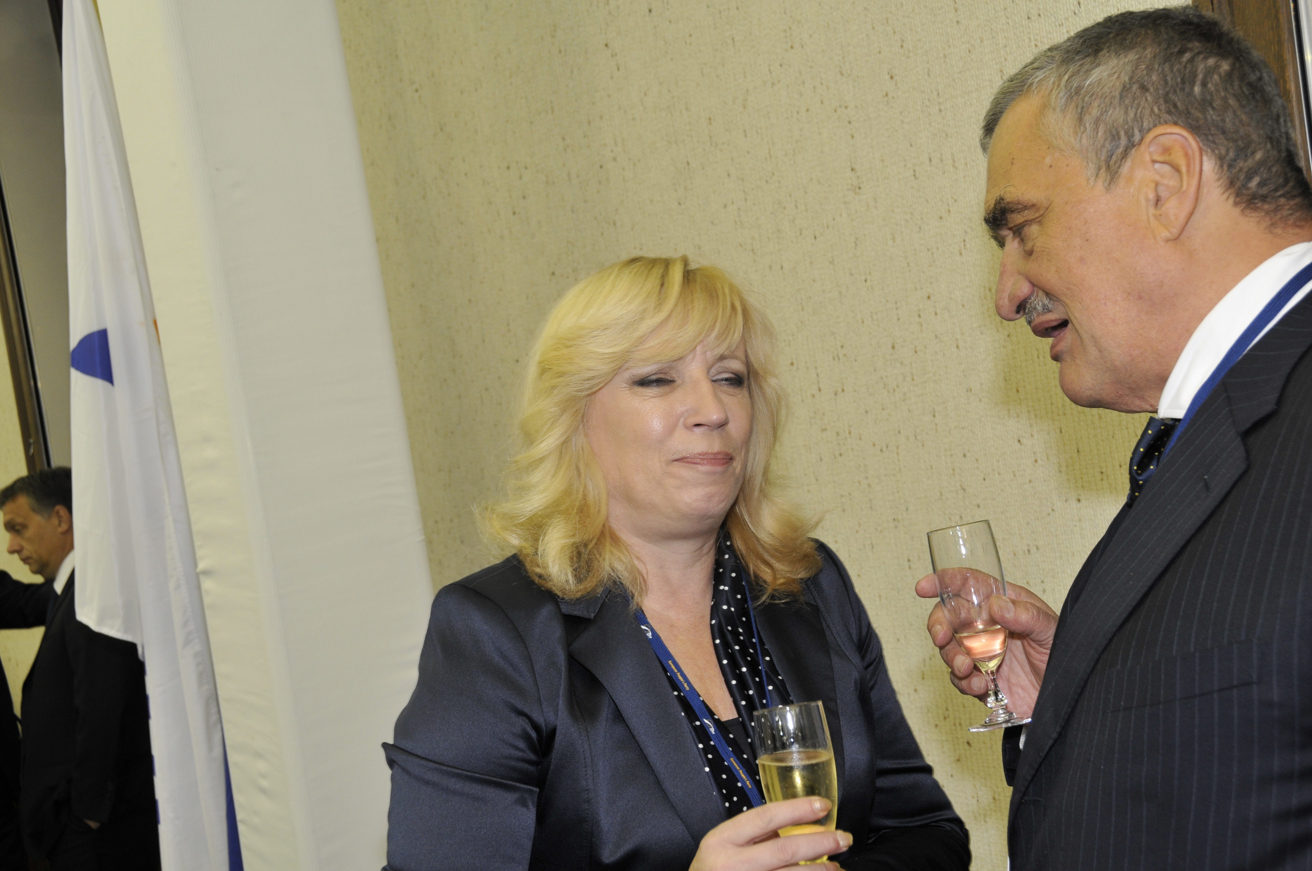 EPP Summit September 2010